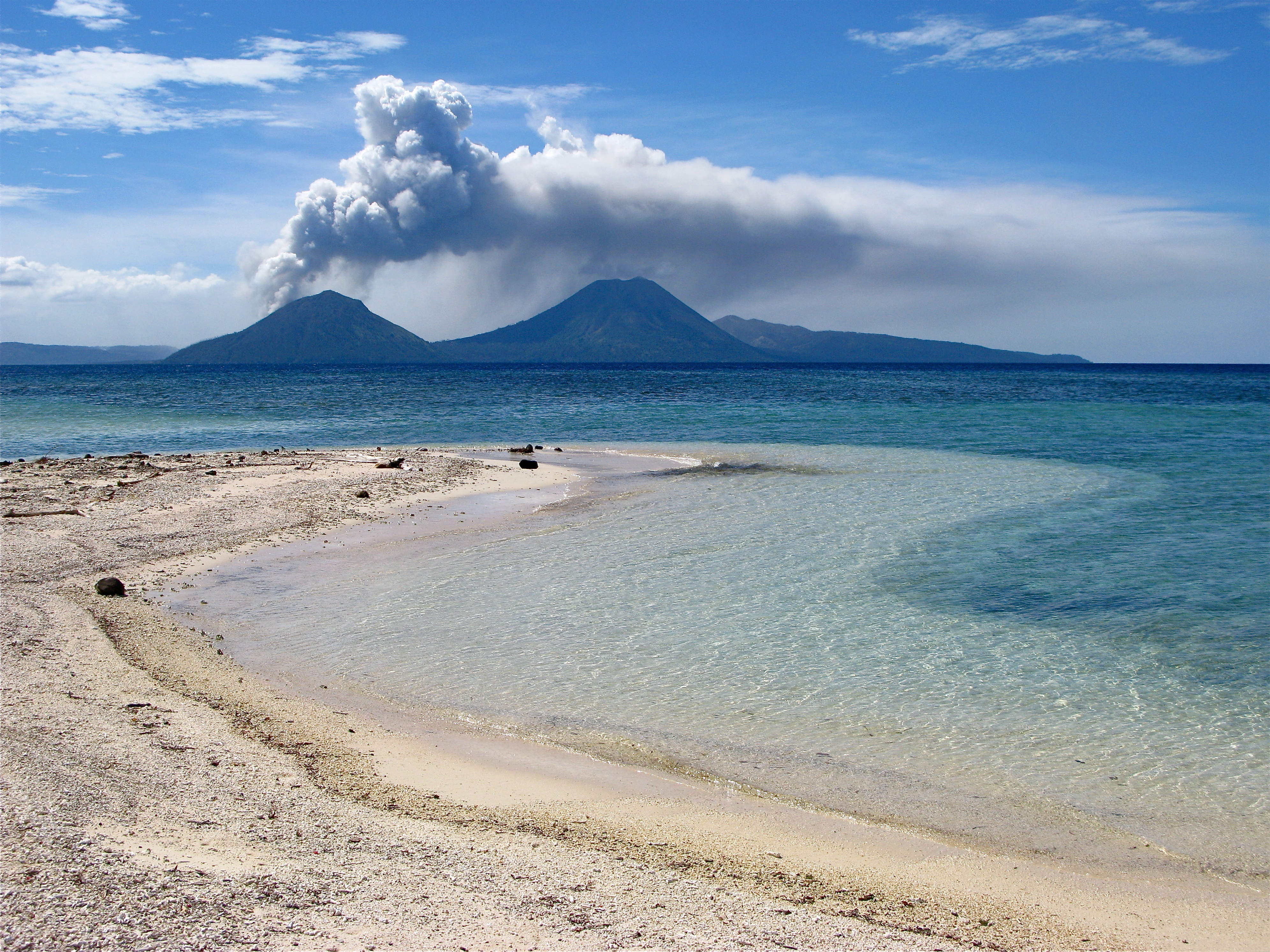 Sun, Sea, Sand And Volcano